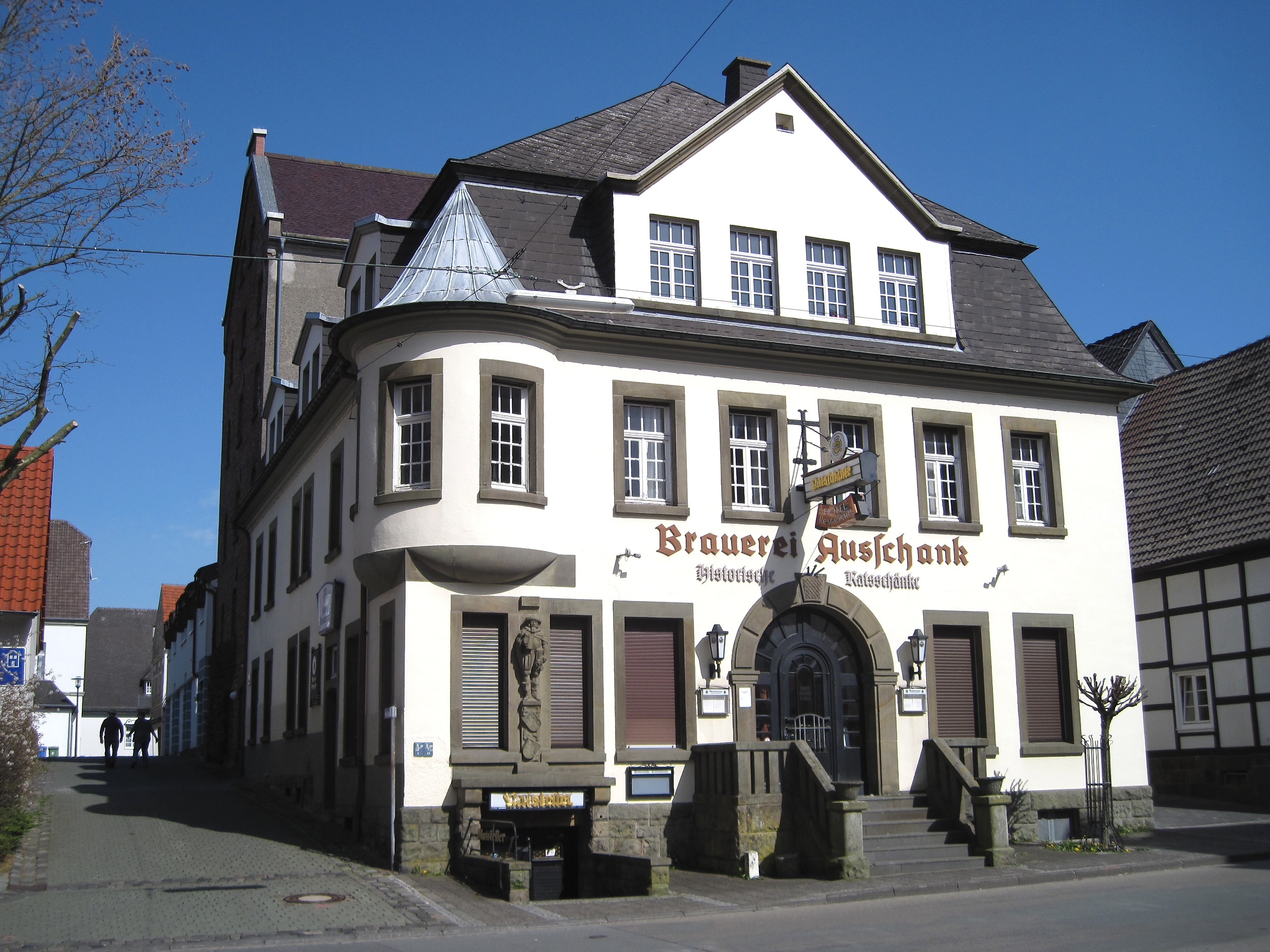 Historische Ratsschänke in Rüthen, Hachtorstraße 23. This image shows a heritage building in Germany, located in the North Rhine-Westphalian city Rüthen (no. unbekannt).